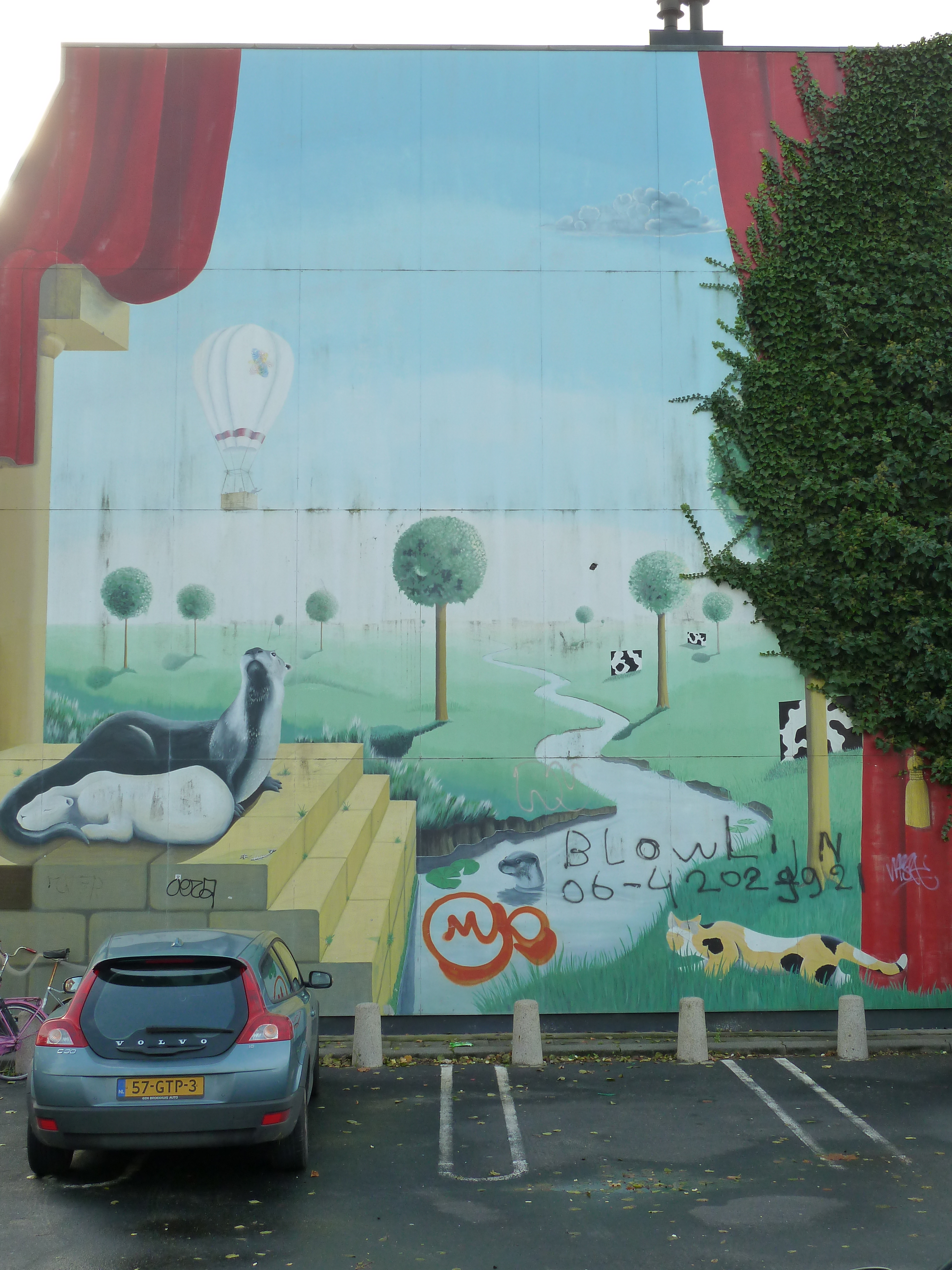 Otterstraat 116, hoek Oudenoord, Utrecht, NL. Muurschildering uit 1996 door Xandra Smit en Milan Koopman. Herinnert aan de Otterstroom die hier voorheen stroomde. De muurschildering is begin 2011 ernstig gevandaliseerd na de kleinere vandalismegevallen die op de afbeelding zichtbaar zijn. In oktober 1985 werd op dezelfde muur een schildering aangebracht door vier leerlingen van de Academie voor Beeldende Kunsten in opdracht van Concordia Verzekeringen. Die schildering toonde de buurt vanuit ballonperspectief, waarbij de schildering als Droste-effect ingepast werd. (